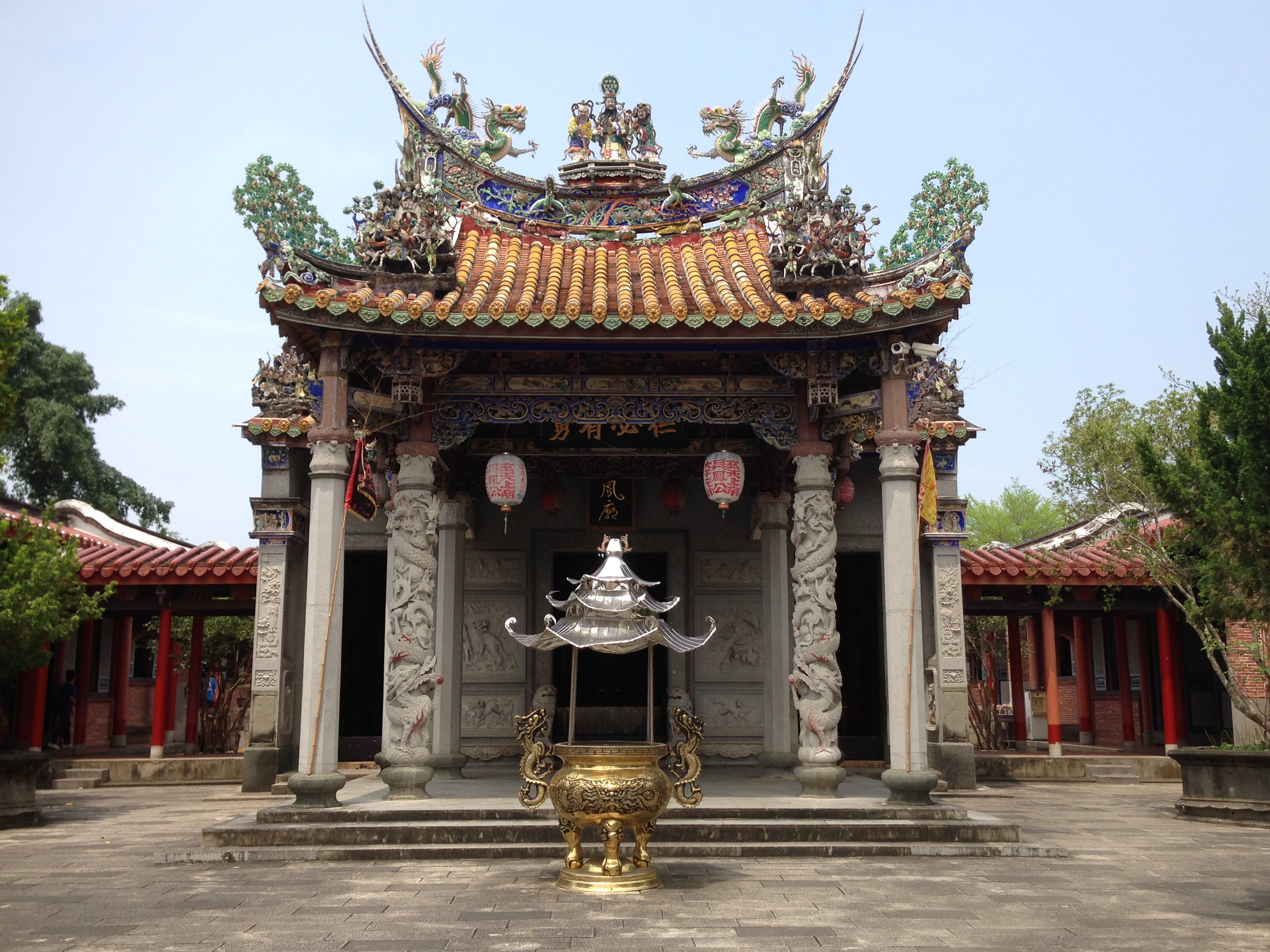 中文（台灣）: 吳鳳廟前殿